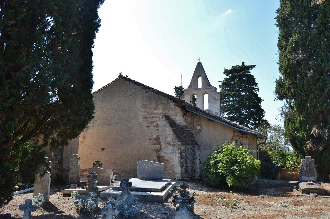 Chapelle Sainte-Sigolène de Parisot (81).